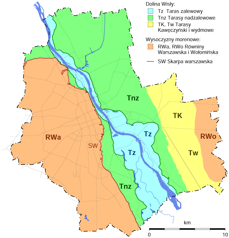 Główne jednostki geomorfologiczne w Warszawie. Skróty stosowane w literaturze: Tz, TZ - taras zalewowy Tnz, TNZ - tarasy nadzalewowe Tw, TW - tarasy wydmowe Skróty dodane przez użytkownika Darekk2: RWa - Równina Warszawska (zamiast WWI, WWII, WWIII Wysoczyzna Warszawska) RWo - Równina Wołomińska (zamiast WS Wysoczyzna Siedlecka) TK - Taras Kawęczyński (zamiast TR Taras Radzymiński) SW - skarpa warszawska Mapka wykonana przy pomocy programu GMT 5.1.1 z zastosowaniem linii z plików KML.